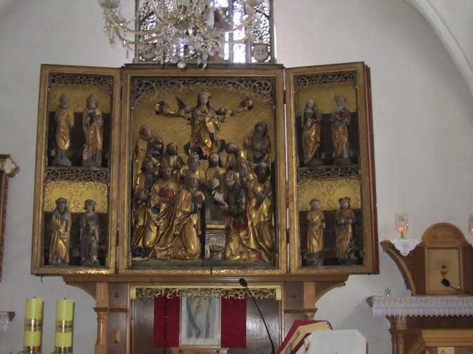 Ołtarz Wniebowzięcia NMP w Pisarzowicach